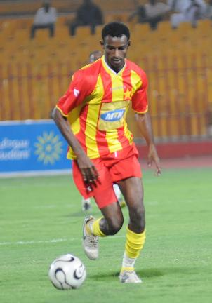 احمد الباشا لاعب المريح